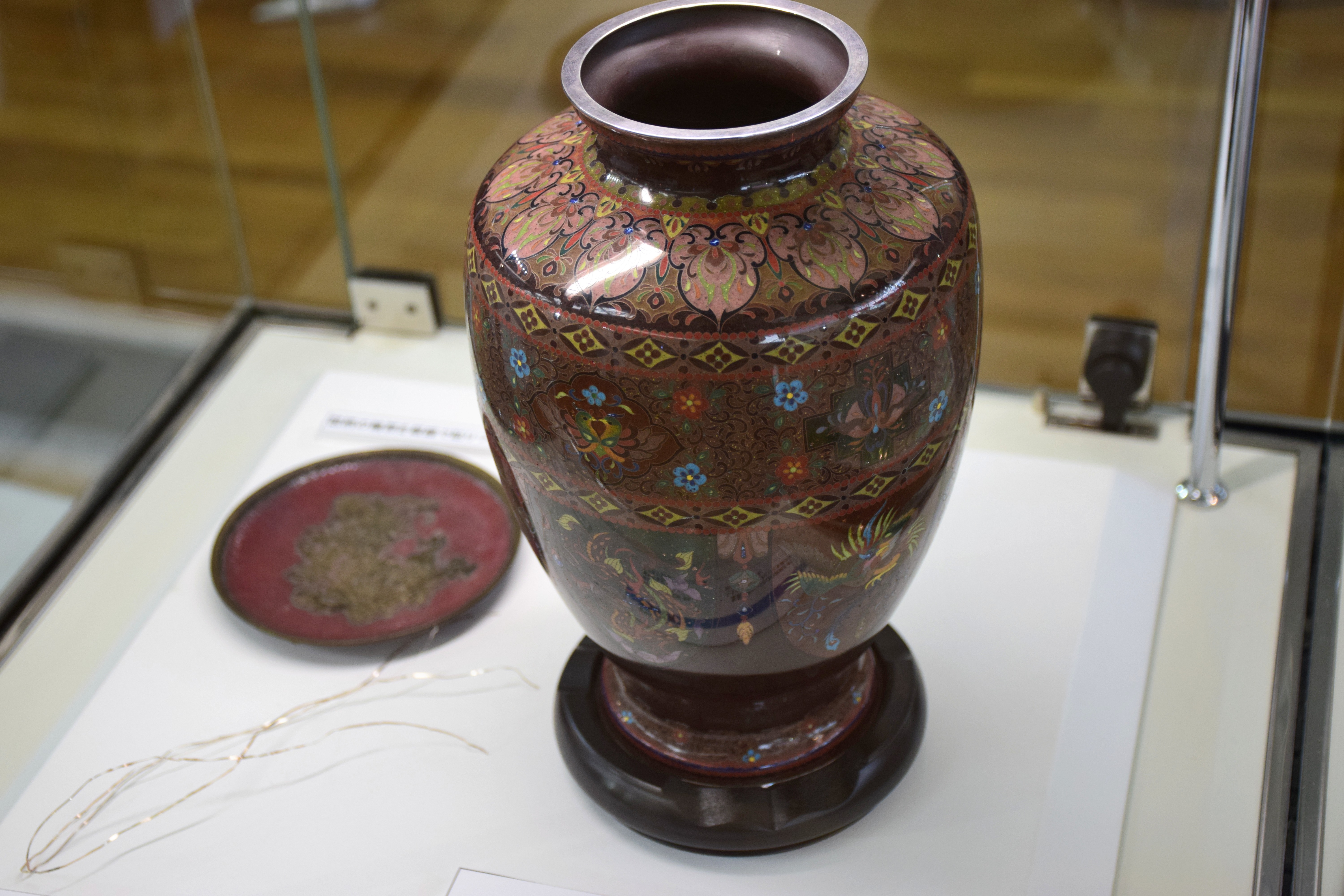 あま市の尾張七宝